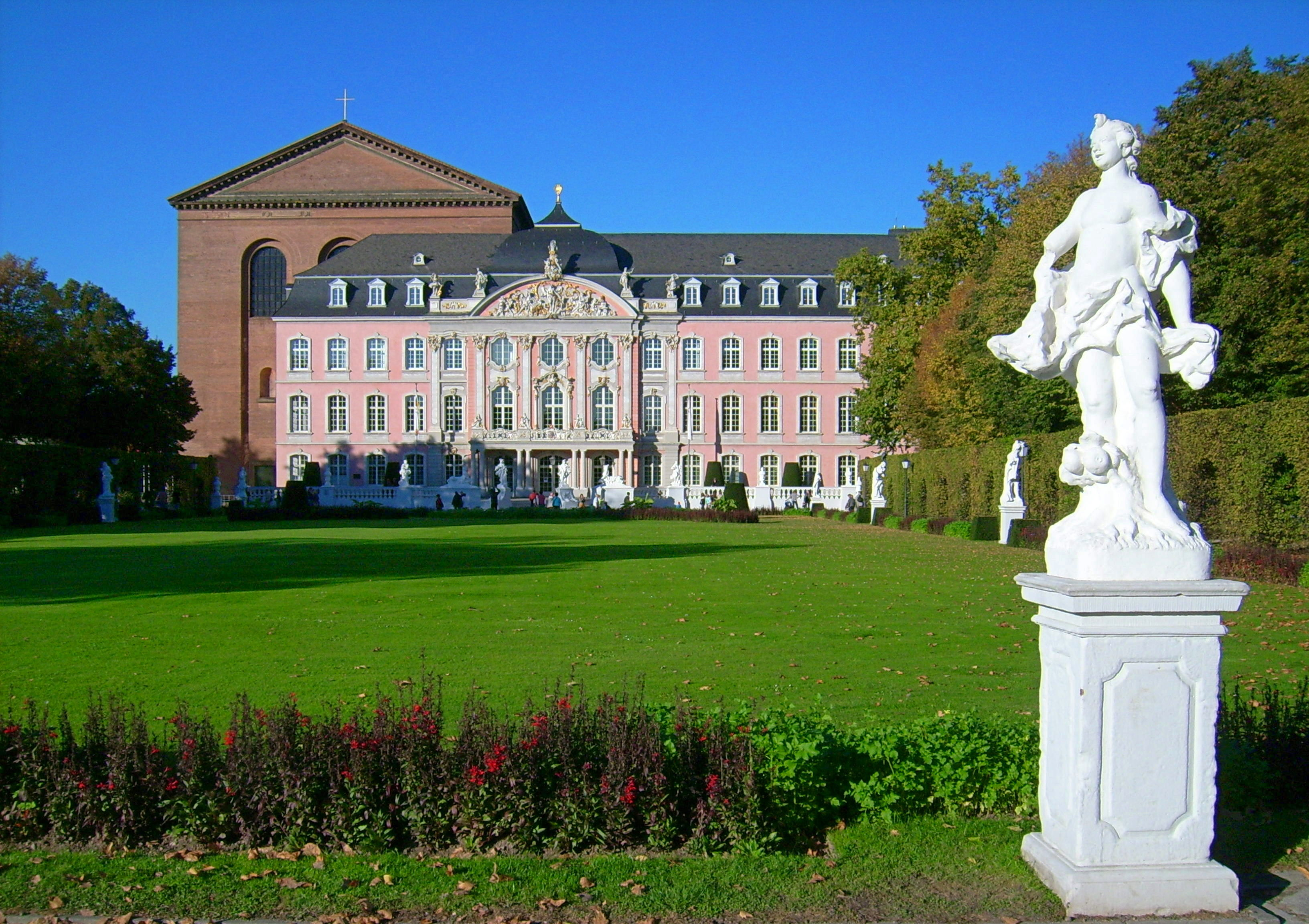 Basilika in Trier und Kurfürsten Palais